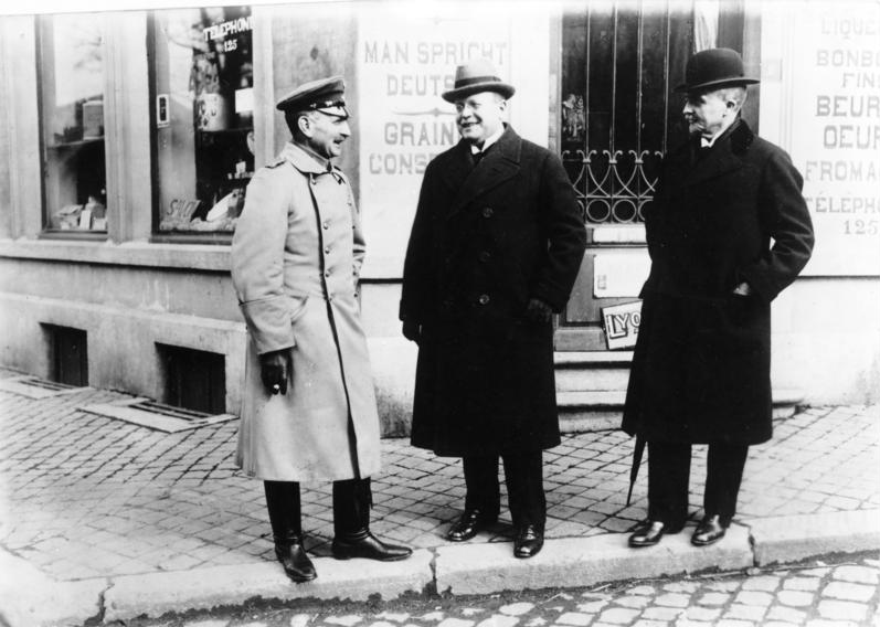 Spaa, deutsche Waffenstillstandskommission ADN-ZB/Archiv Belgien: Waffenstillstands-Kommission 1919 in Spaa Staatsminister M. Erzberger (Mitte) mit General von Hammerstein und Unterstaatssekretär Freiherr von Langwerth-Simmern [Belgien, Spa.- Mitglieder der deutschen Waffenstillstandskommission, vlnr: General Hans von Hammerstein-Gesmold, Matthias Erzberger, Freiherr Ernst von Langwerth-Simmern] Abgebildete Personen: Erzberger, Matthias: Reichsfinanzminister, Vizekanzler, Deutschland (GND 11853100X) Hammerstein-Gesmold, Hans von Freiherr: Generalmajor, Heer, Waffenstillstandskommission in Spaa, Deutschland Langwerth von Simmern, Ernst von Freiherr: Botschafter in Spanien, Deutschland